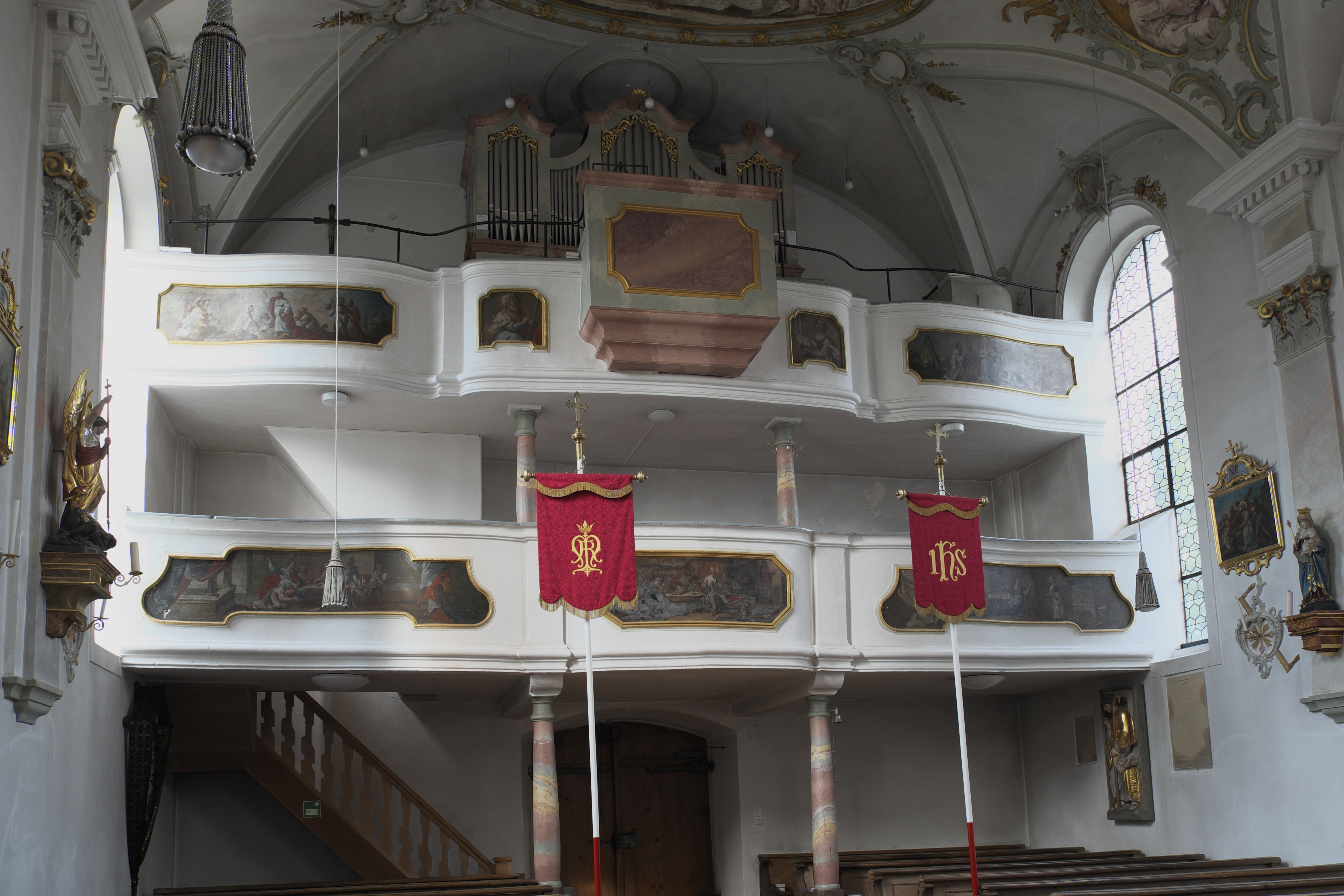 Katholische Pfarrkirche Zur Schmerzhaften Muttergottes in Waalhaupten (Waal) im Landkreis Ostallgäu (Bayern/Deutschland), Empore